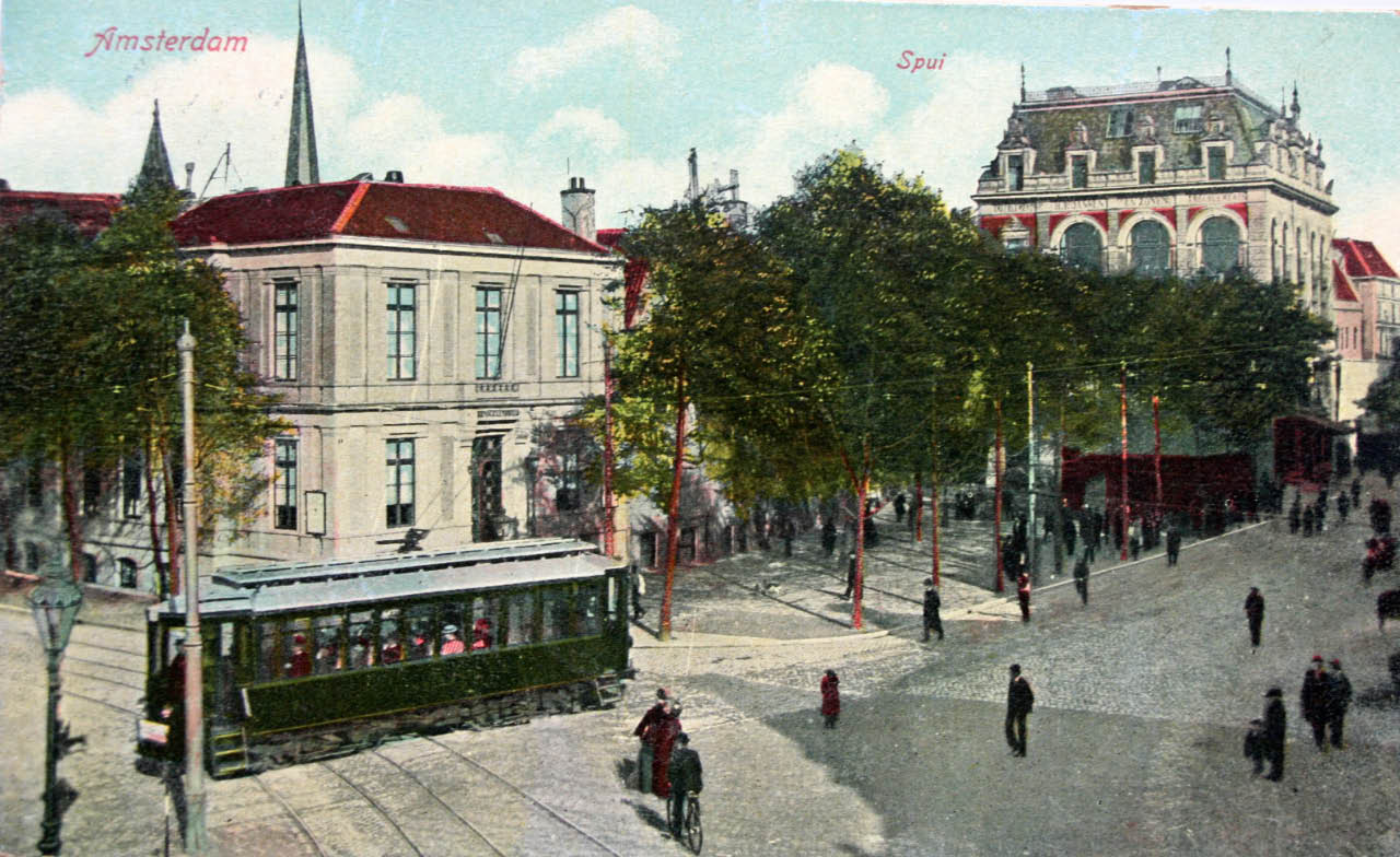 Postcard of Amsterdam. Amsterdam Spui. Groene motorwagen ('Kikker') van de tramlijn Amsterdam - Haarlem - Zandvoort.